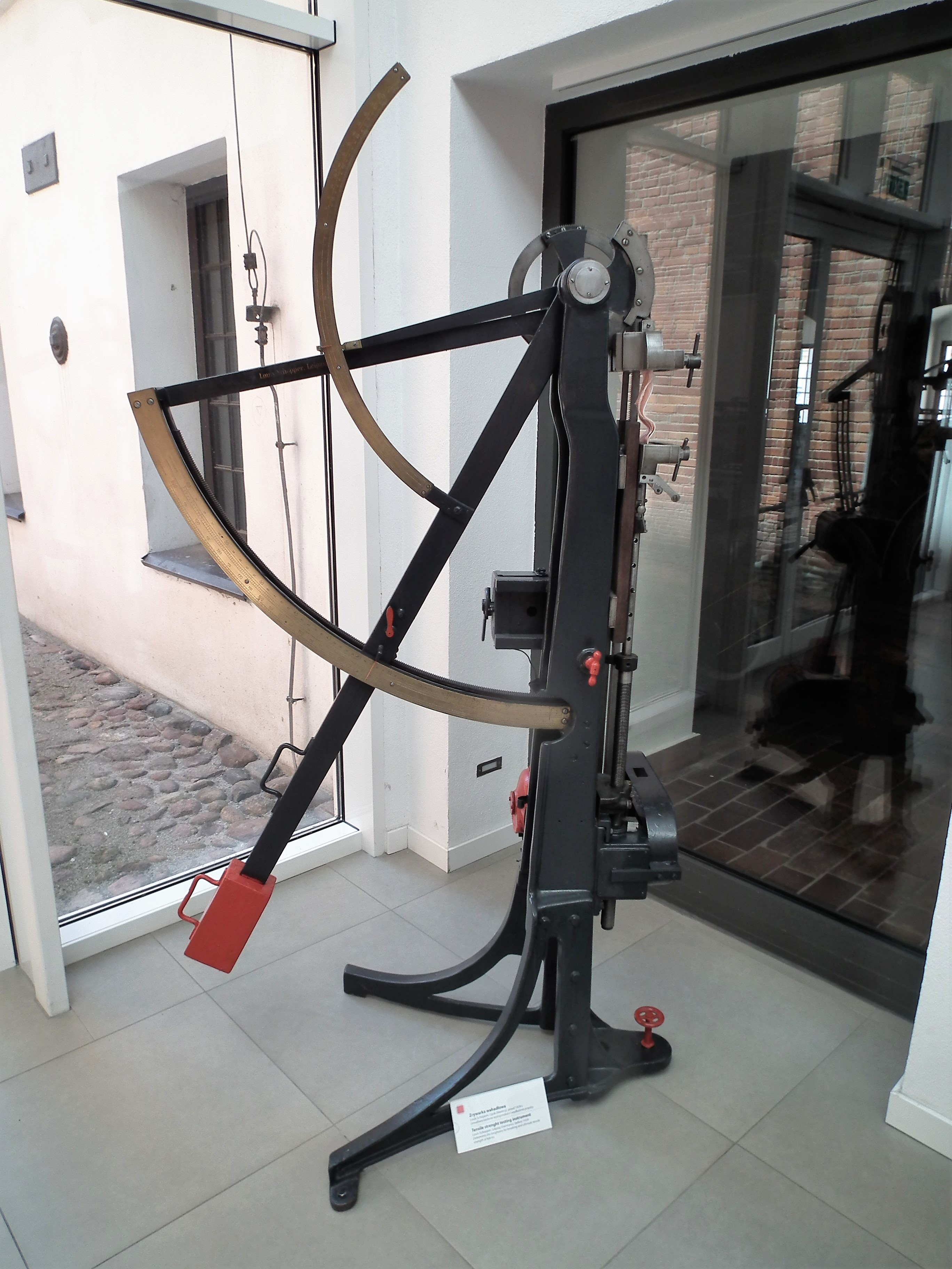 Centralne Muzeum Włókiennictwa, Łódź - zrywarka wahadłowa.